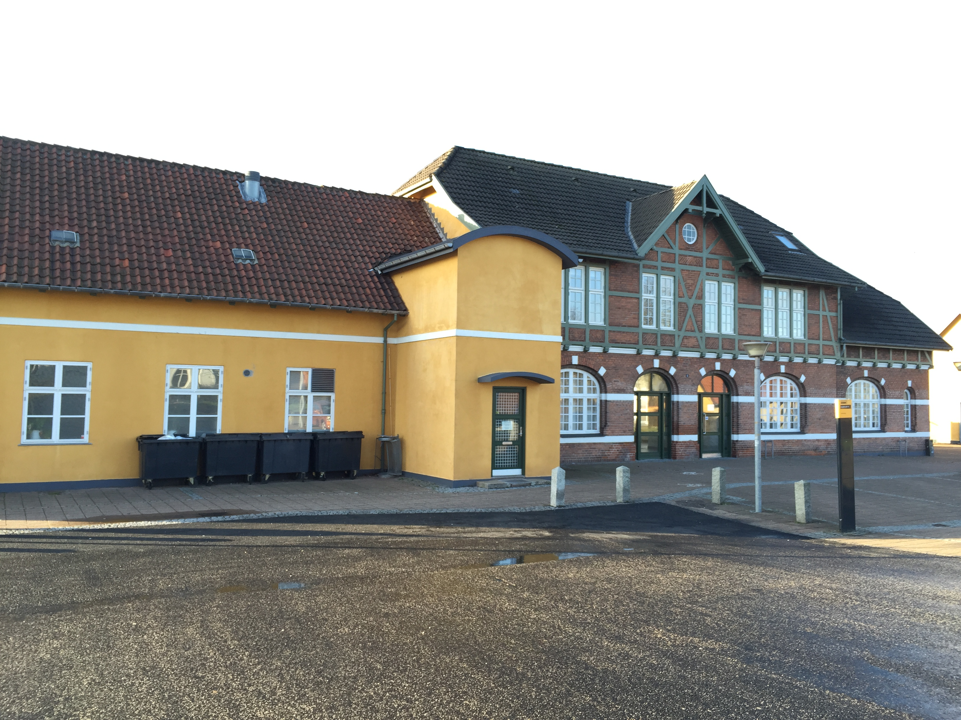 Frederiksværk Station 17. januar 2015